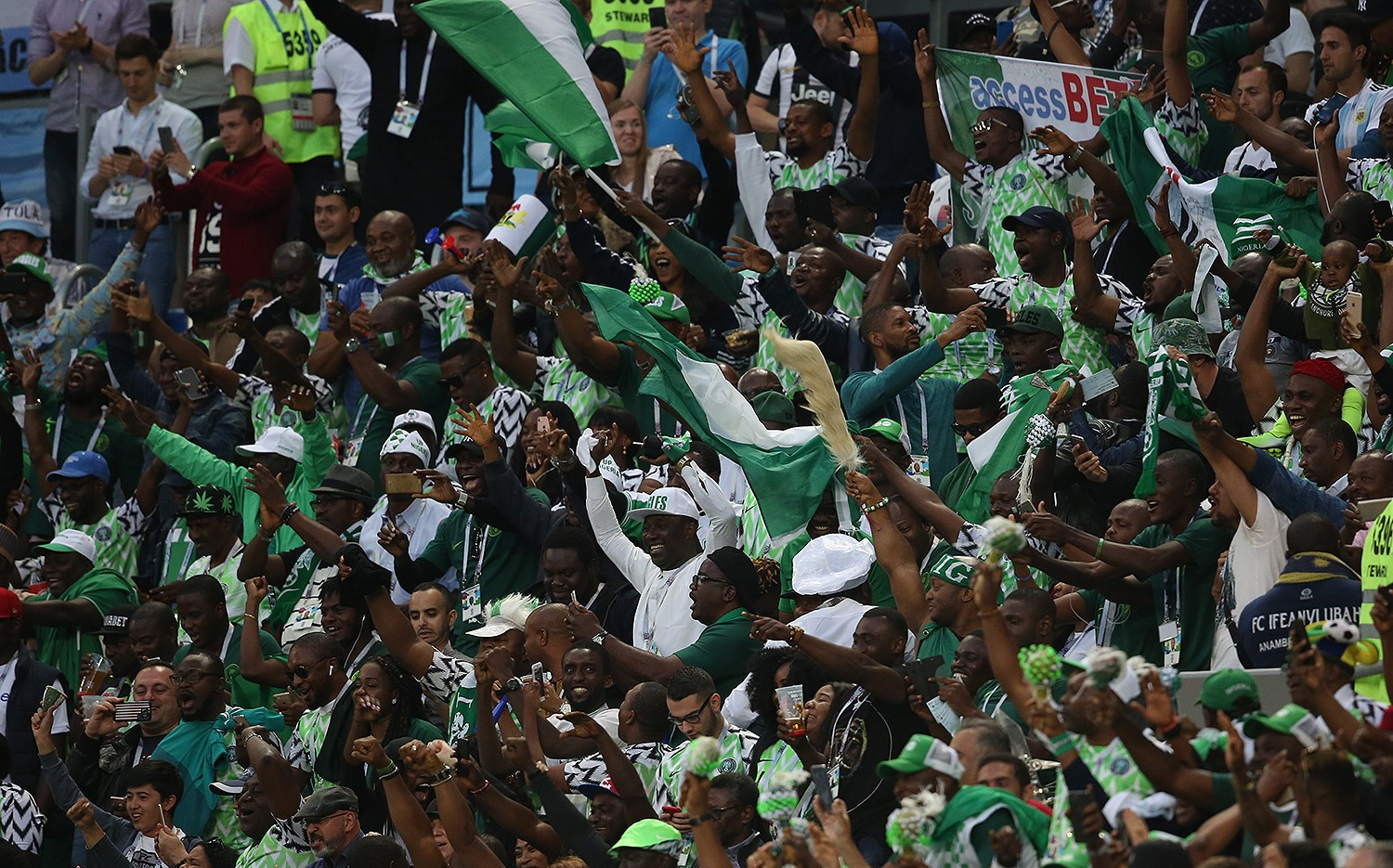 Гол Рохо в концовке выводит Аргентину в плей-офф чемпионата мира